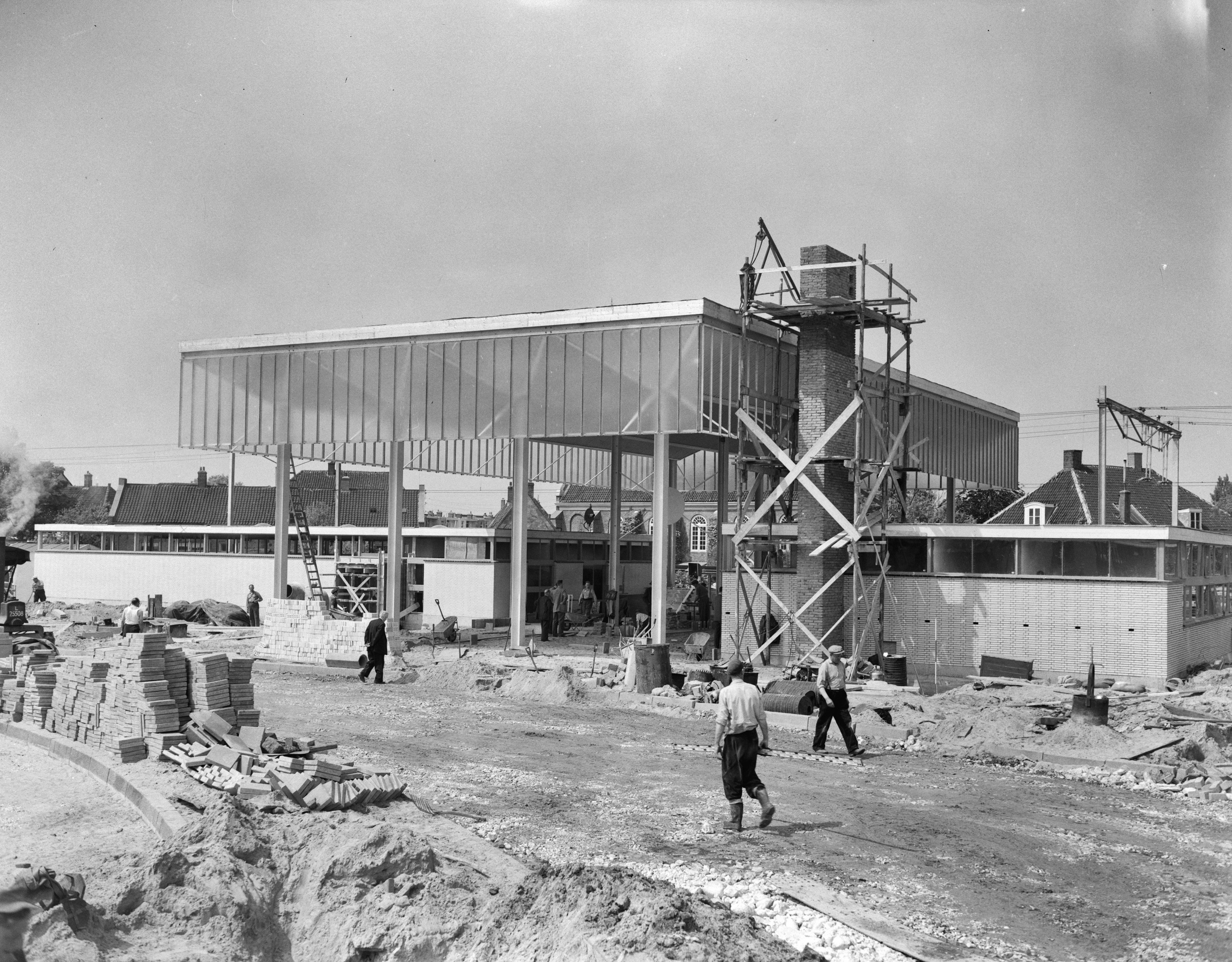 Collectie / Archief : Fotocollectie Anefo Reportage / Serie : [ onbekend ] Beschrijving : Aanbouw Station Sloterdijk. Buitenaanzicht Datum : 24 mei 1956 Trefwoorden : aanbouw, stations Fotograaf : Rossem, Wim van / Anefo Auteursrechthebbende : Nationaal Archief Materiaalsoort : Negatief (zwart/wit) Nummer archiefinventaris : bekijk toegang 2.24.01.04 Bestanddeelnummer : 934-5903 Reacties Geplaatst door Maaike op 21 juli 2013 - 18:32. Plaats: Amsterdam; Noord-Holland